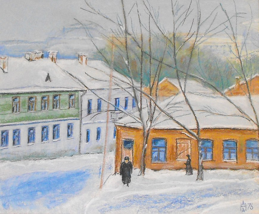 Минск. Перекресток улиц Замковой и Освобождения. Территория бывшего гетто. Пастель. ДВП. 1976 год. Художник - Анатолий Наливаев.